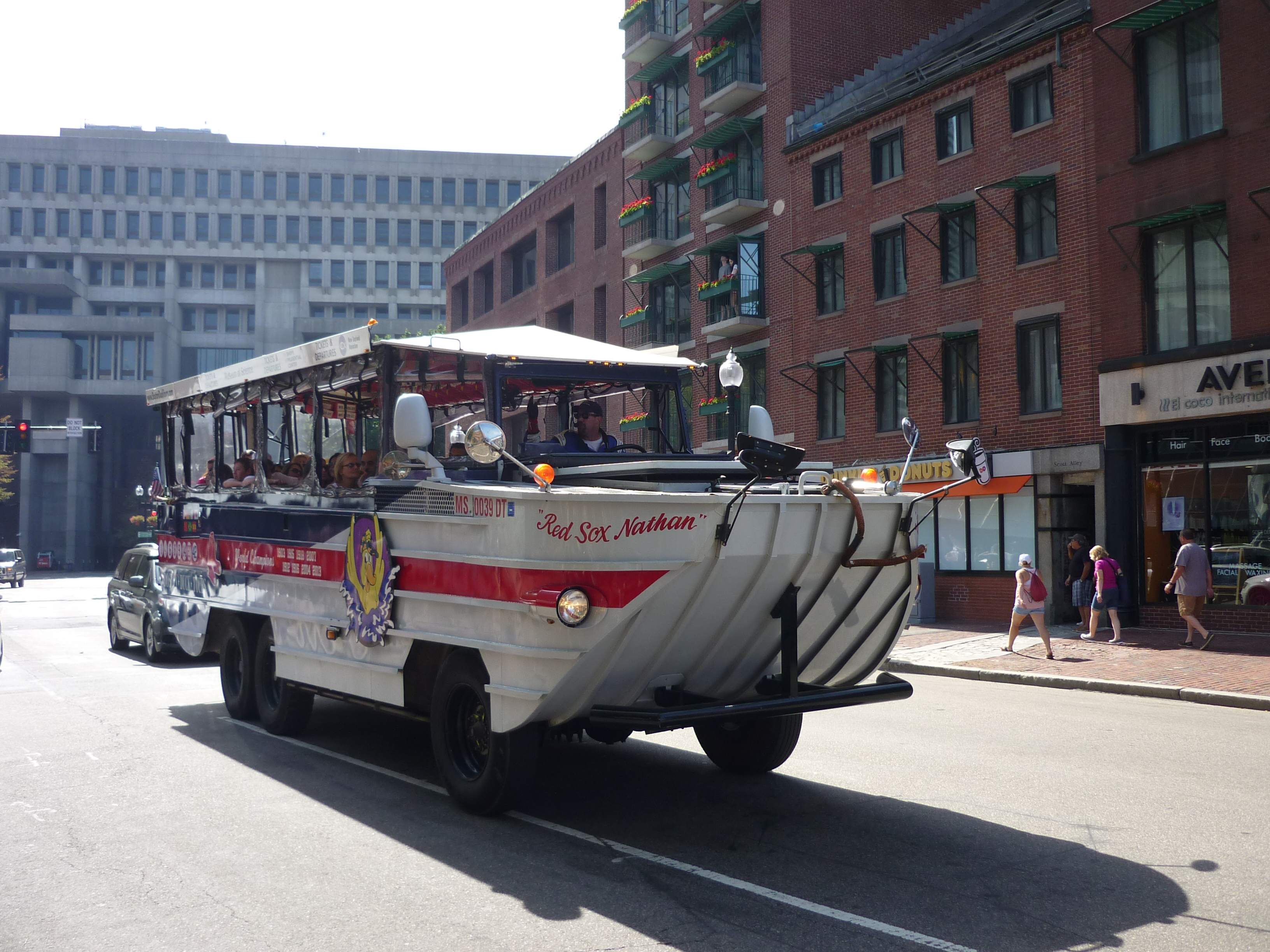 Un DUCK pour transport de tourisme à Boston.